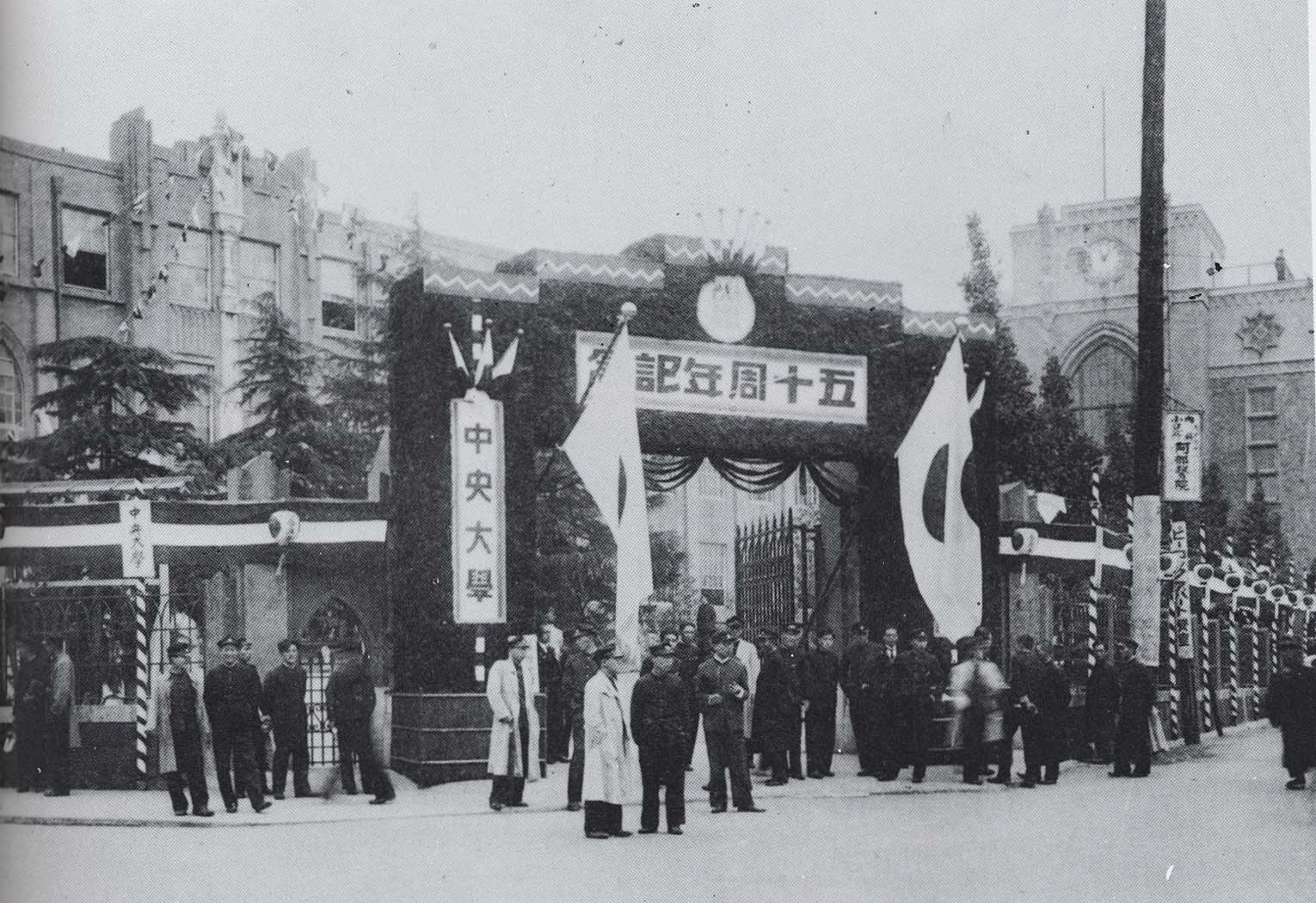 学園創立50周年記念式典当日の大学正門前